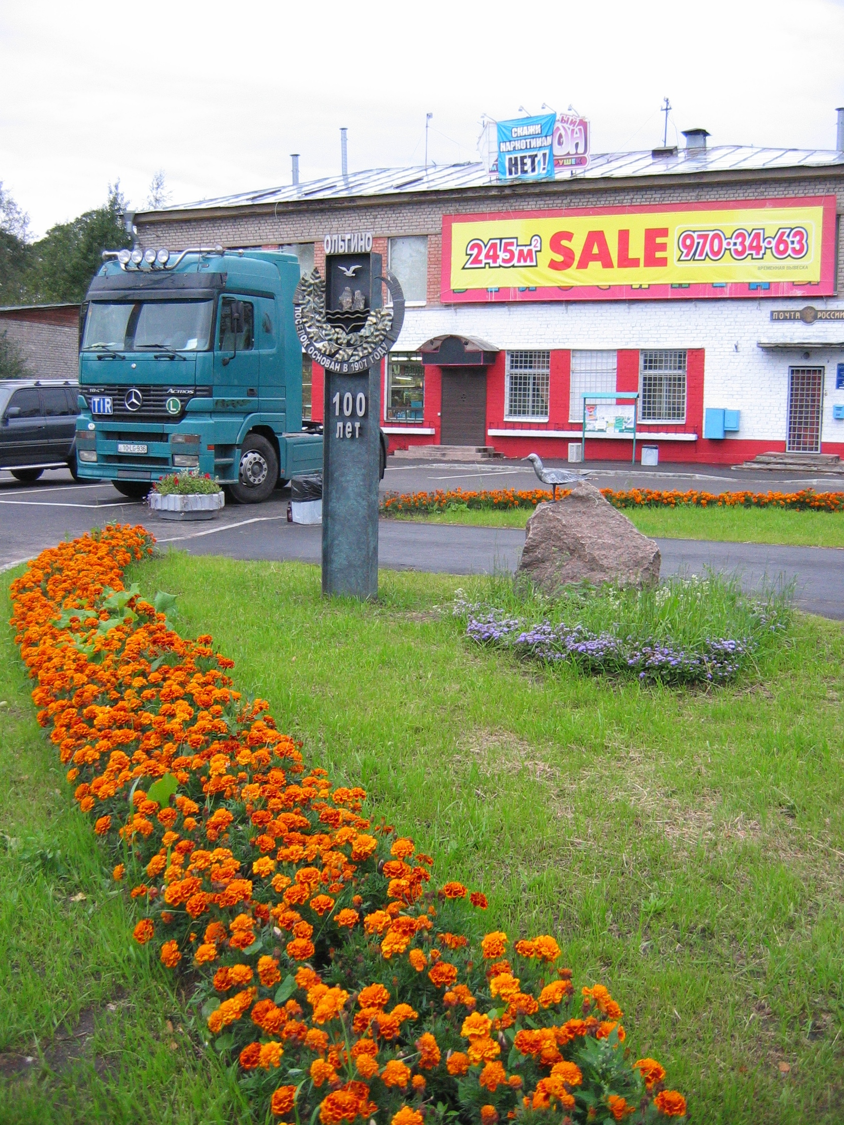 olgino